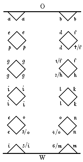 Anordnung der Wappen an den Säulen in der Sternberger Stadtkirche